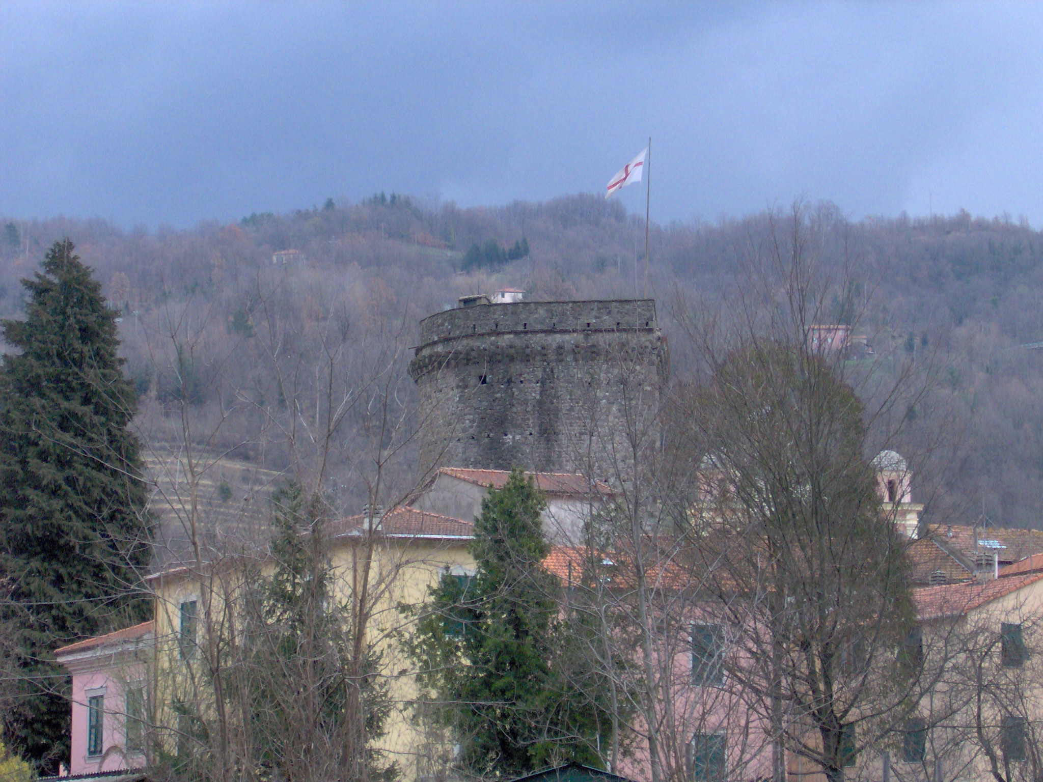 La Torre.